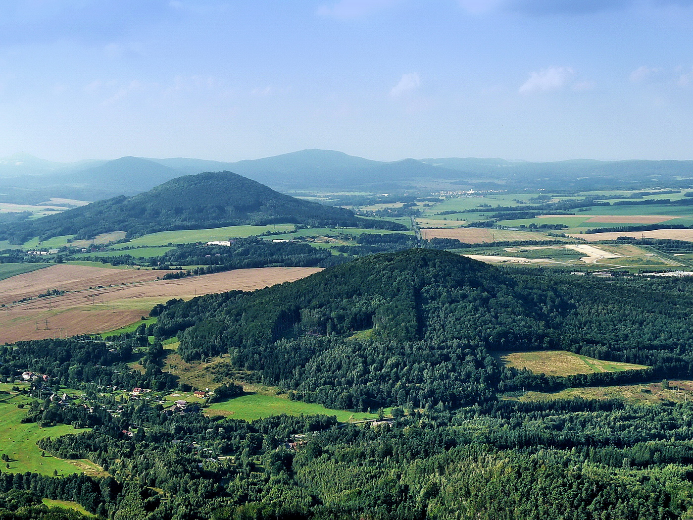 Lipka a Tlustec z Ralska